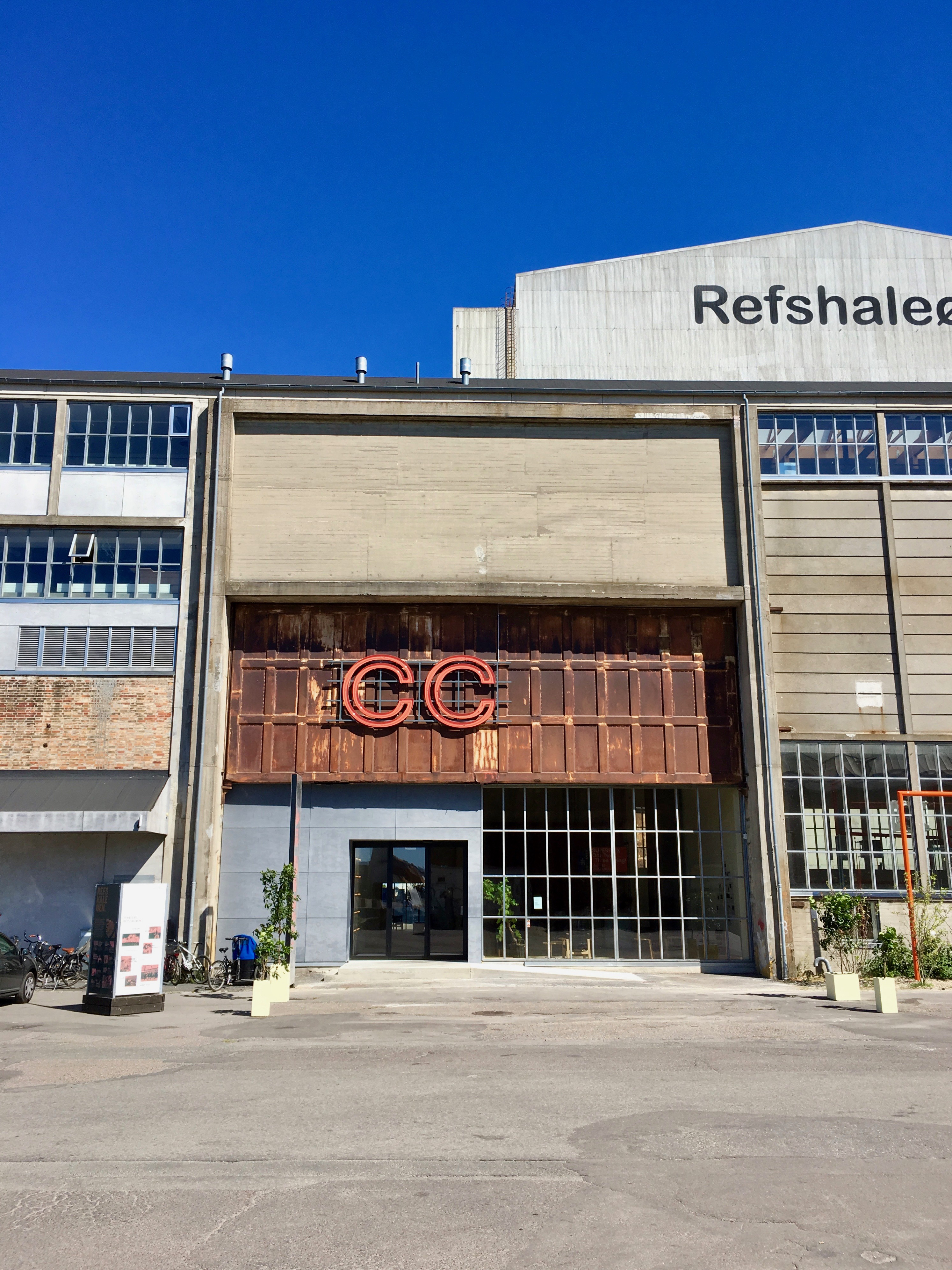 Copenhagen Contemporary, Refshaleøen, København